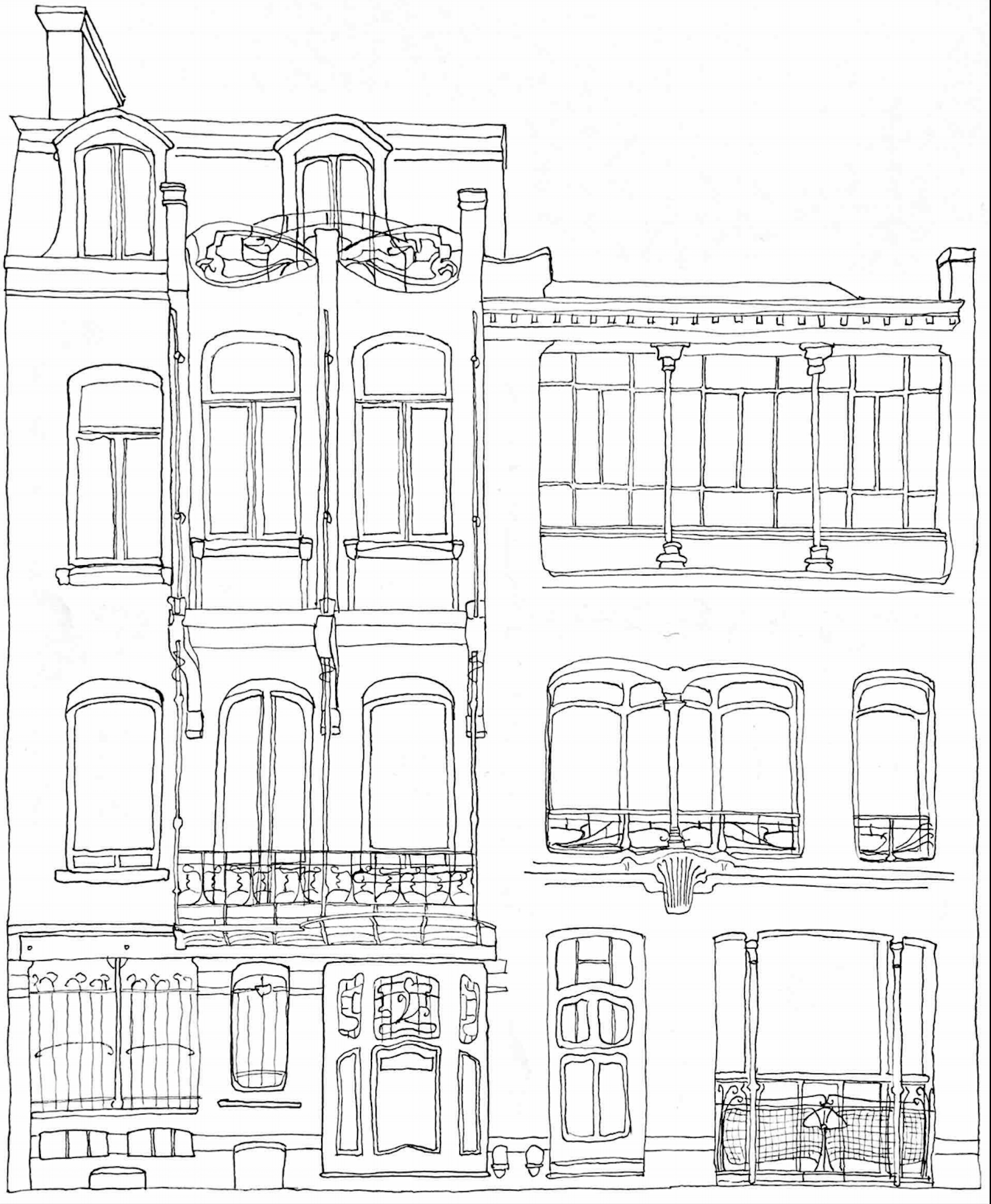 Dessin de la façade de la maison Horta à Bruxelles.